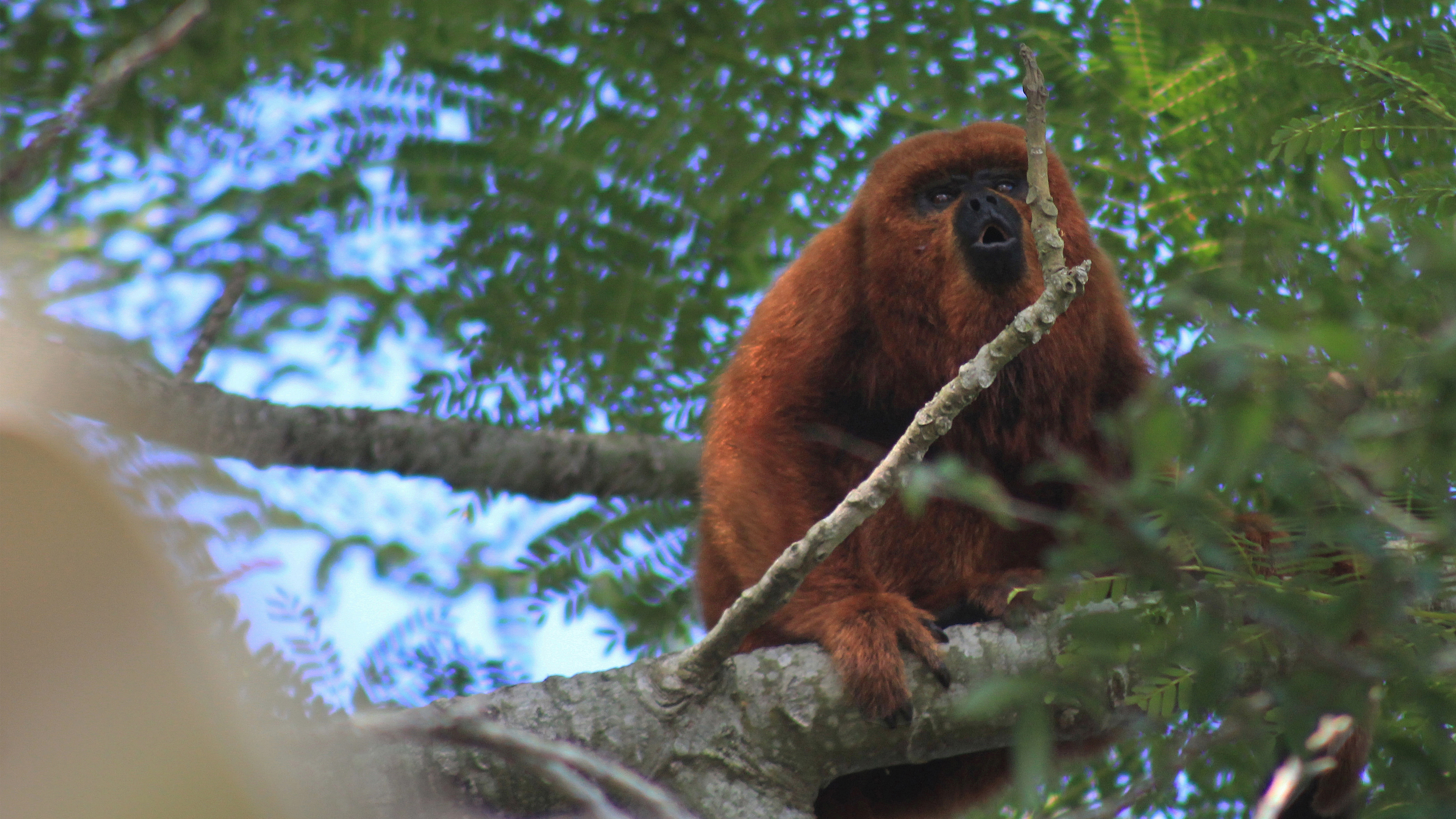 Espécie registrada no distrito de Passo do Verde em janeiro de 2019.